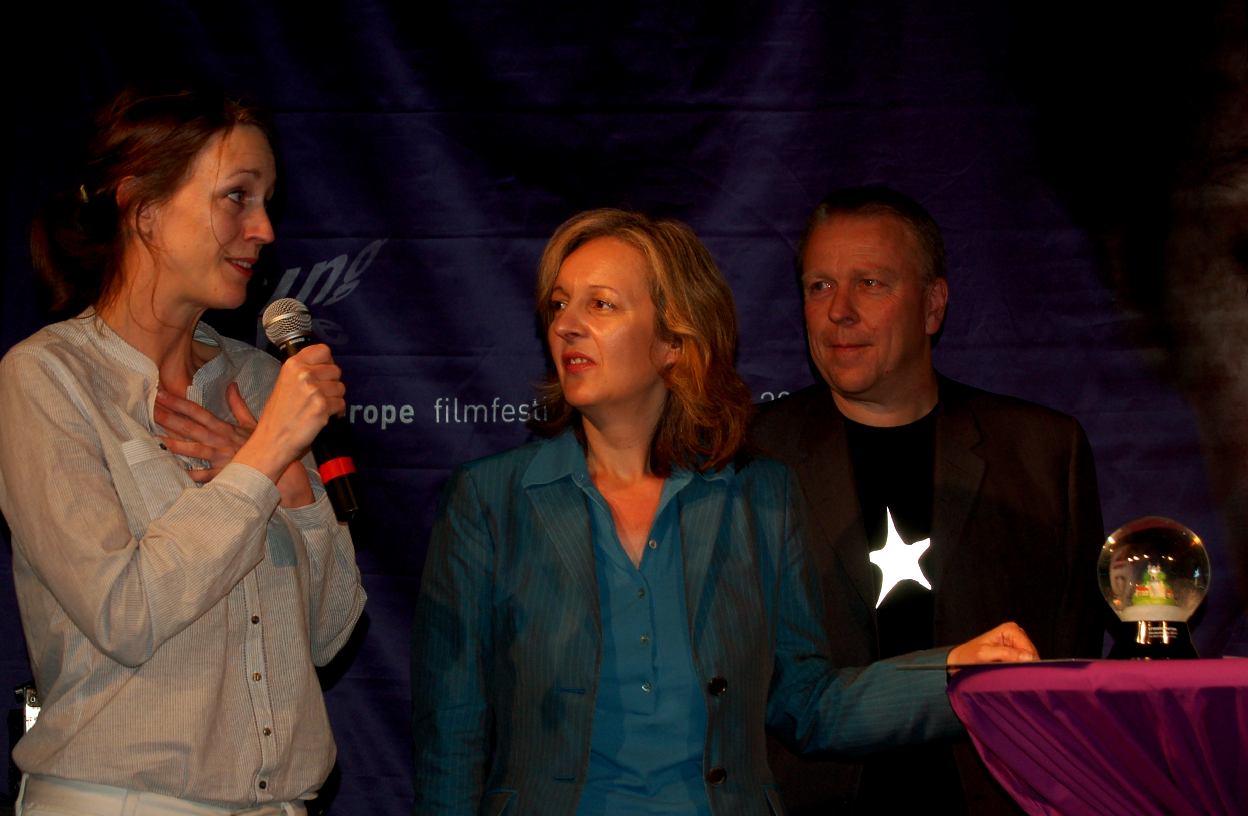 Preisverleihung am Crossing Europe Filmfestival Linz 2007; Regisseurin Pia Marais (links), Festivalleiterin Christine Dollhofer (Mitte), "Linz 09"-Leiter Martin Heller (rechts)